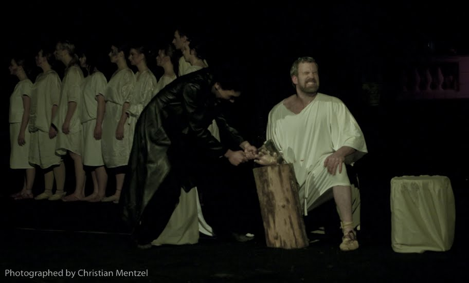 Inzenierung von Holger Hoppla Pester in der Theaterfachschule Bongôrt-v.Roy William Shakespeare " Titus Andronicus"